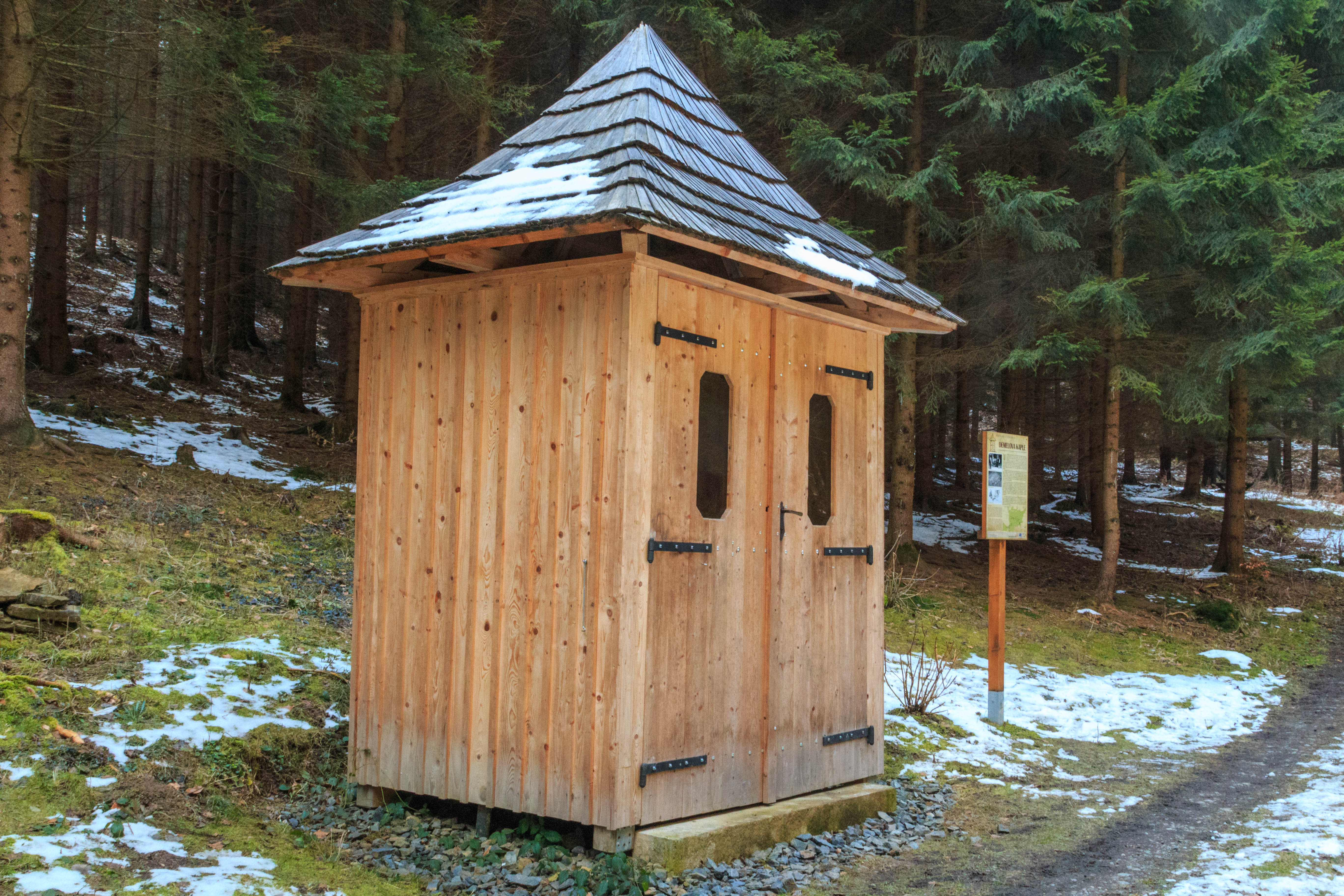 Demelova kaple Project: Chráněná území.